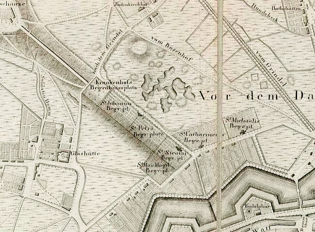 Dammtorfriedhöfe, Ausschnitt aus dem Plan "Hamburg und seine nächsten Umgebungen im Jahre 1810"